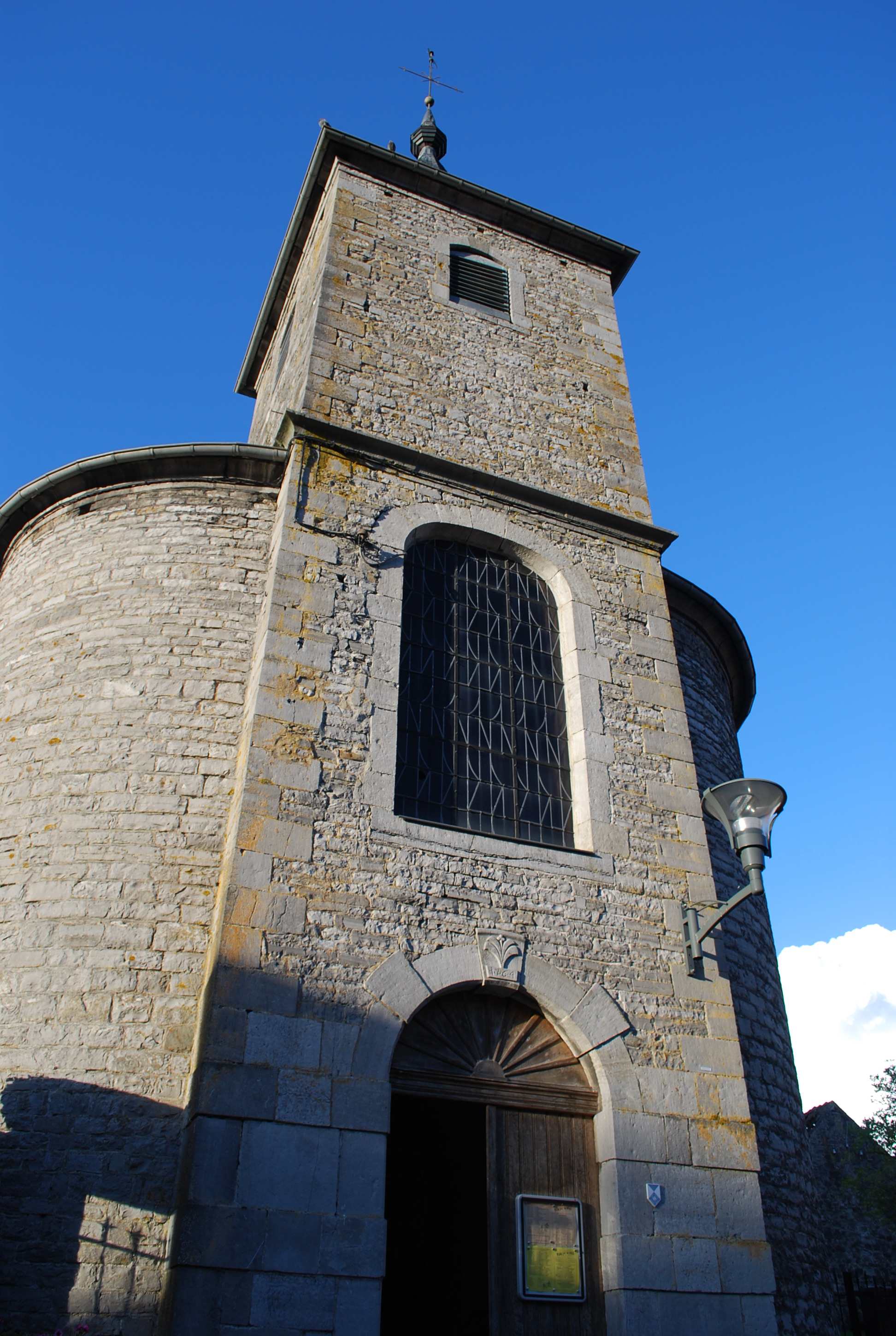 Entrée et clocher de l'Eglise Notre-Dame de la Nativité de Sosoye